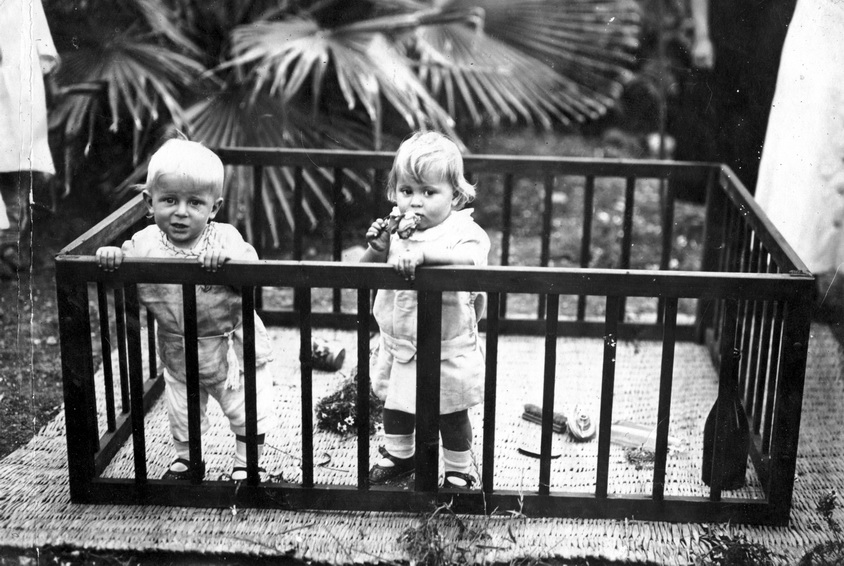 1918, בחצר כנרת עמליה ישראלי ומשל'ה טבנקין - בן ציון ישראלי